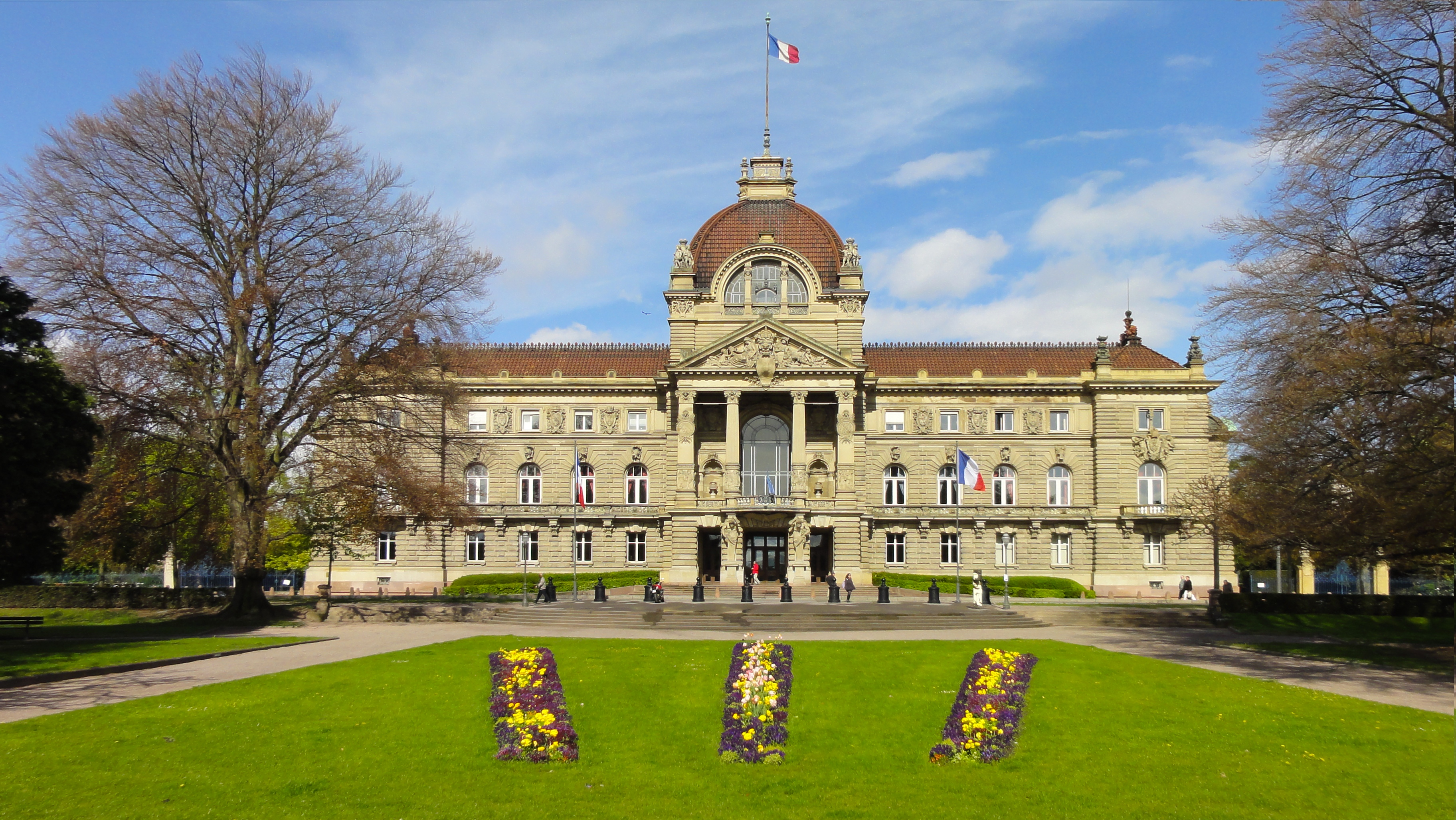 Palais du Rhin